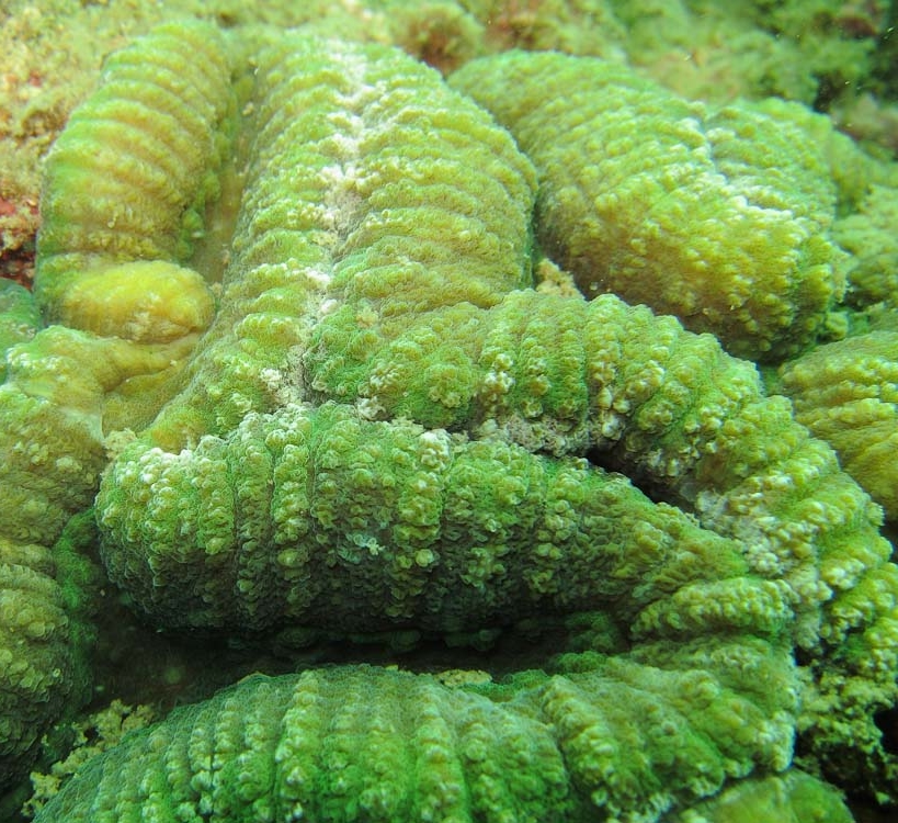 Pólipos de Symphyllia sp. en Koh Phangan, Tailandia